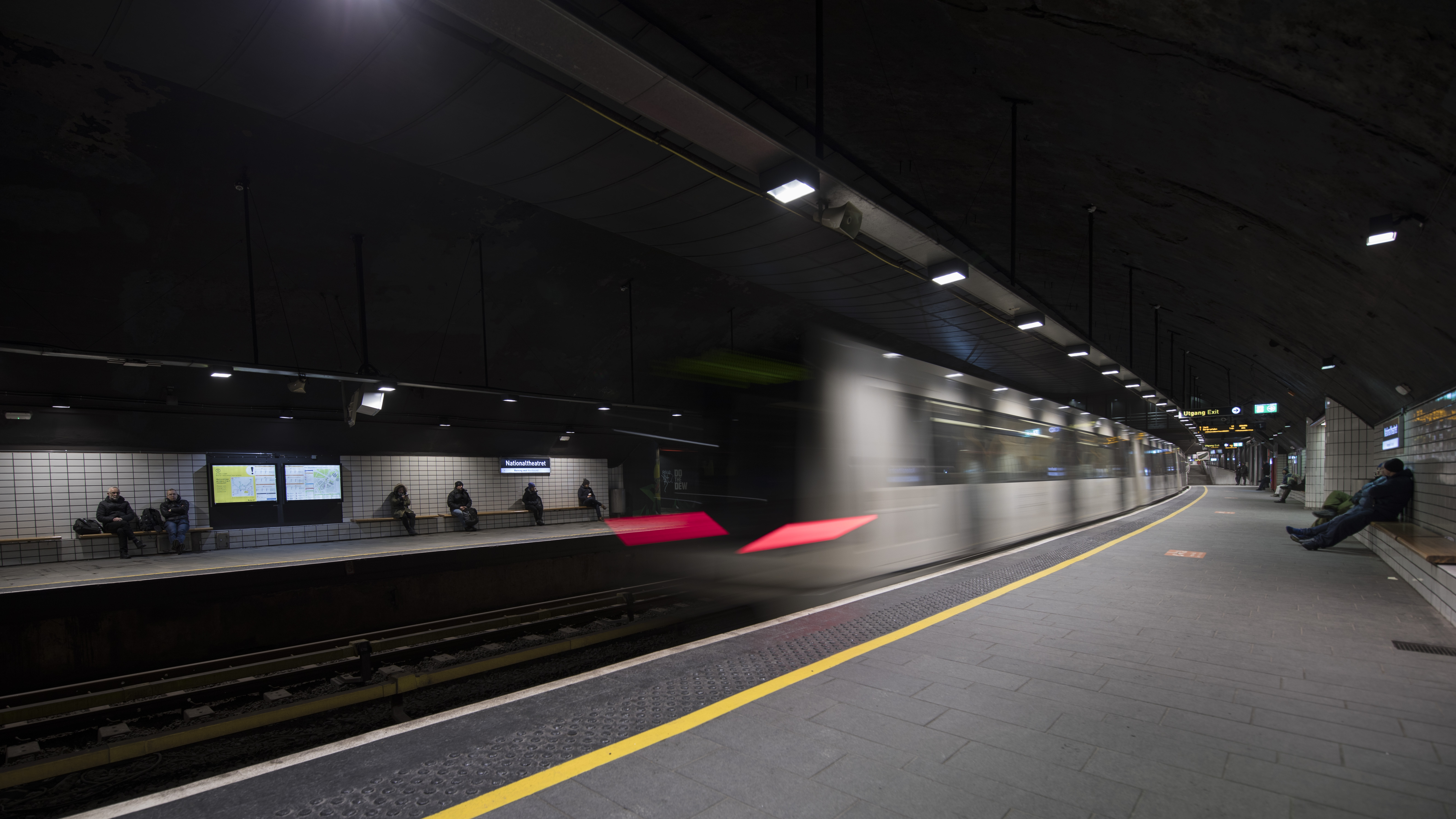 Nationaltheatret T-bane stasjon tatt fra østgående perrong.